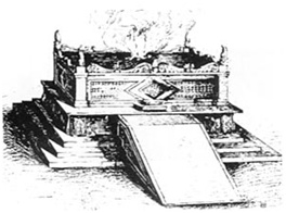 Модель реконструкции бронзового жертвенника Первого Храма.